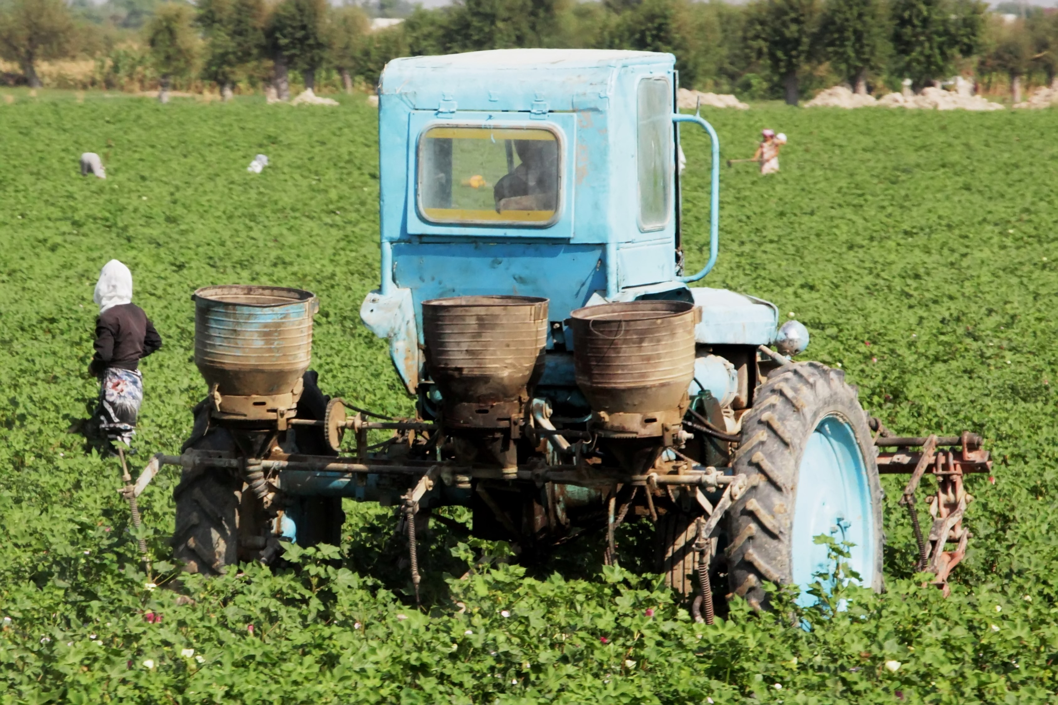 Ein T-28-Traktor für den Baumwollanbau in einem Baumwollfeld in Tadschkistan.